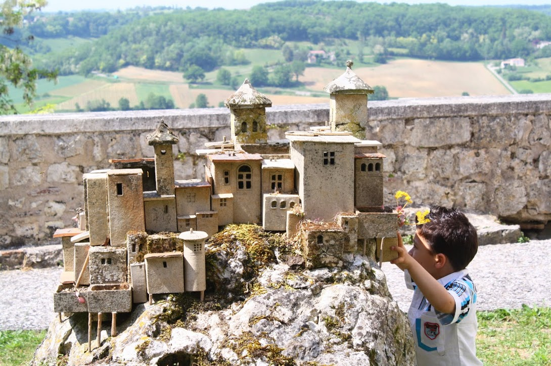 Un garçon avec miniature à l'office du maire (Lauzerte, France)